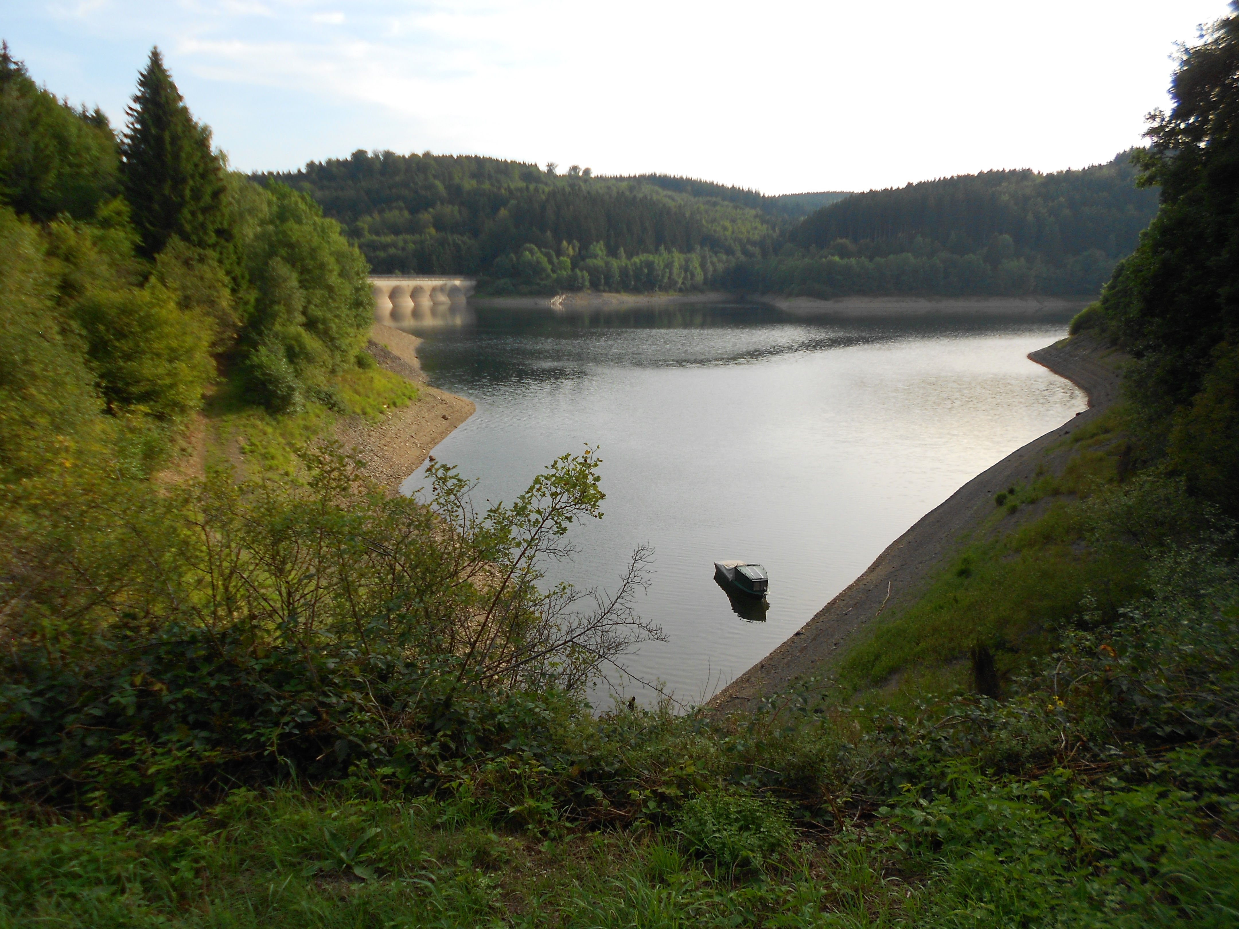 Oleftalsperre, Hellenthal (Eifel, Deutschland).